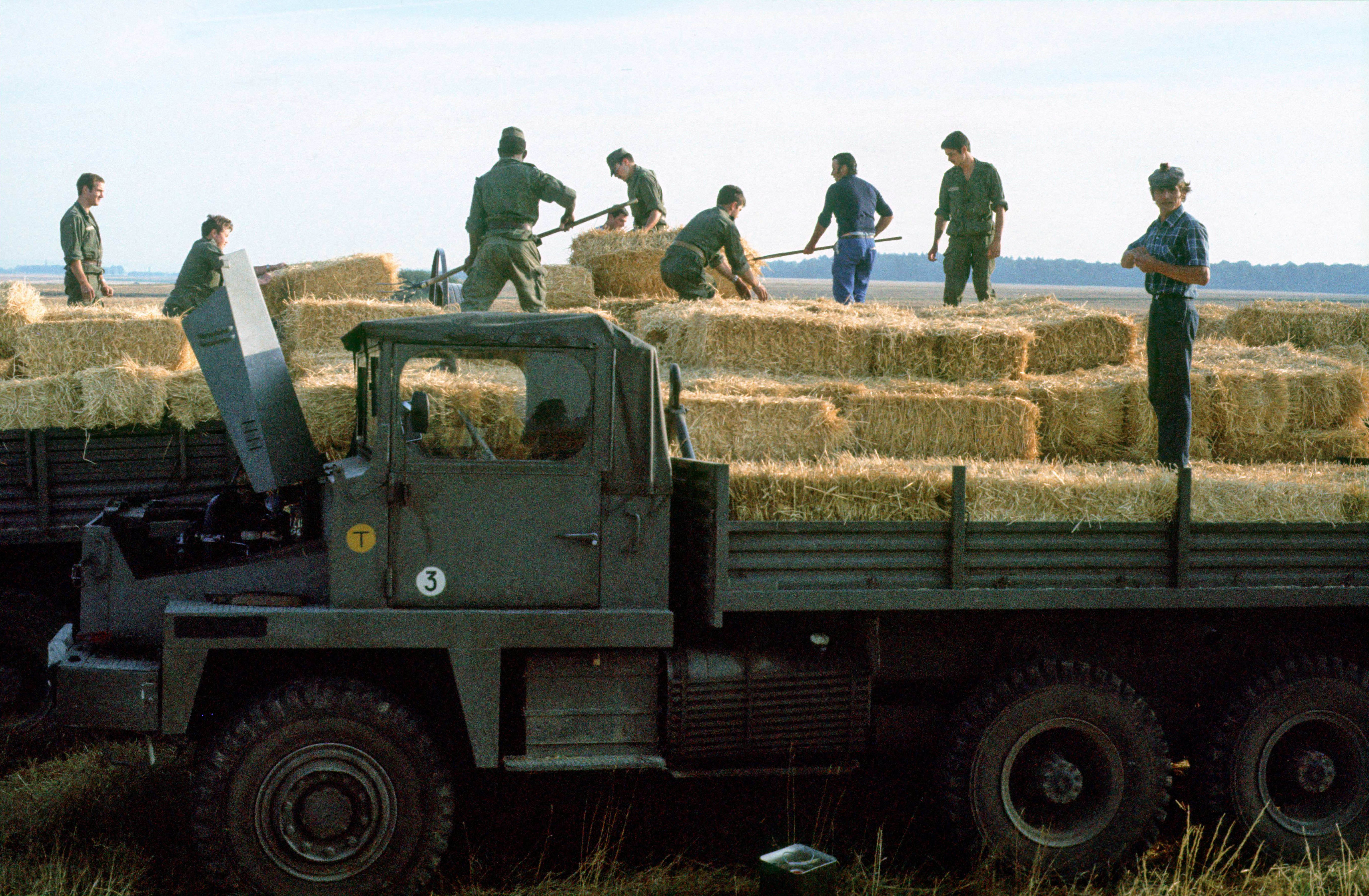 Opération Paille 1976 avec le 57e RT (Mulhouse) et le 511e Groupe de transport lourd (Auxonne). Fermiers bourguignons et membres de la 9/5 chargeant les bahuts du 57e RT avec de la paille.